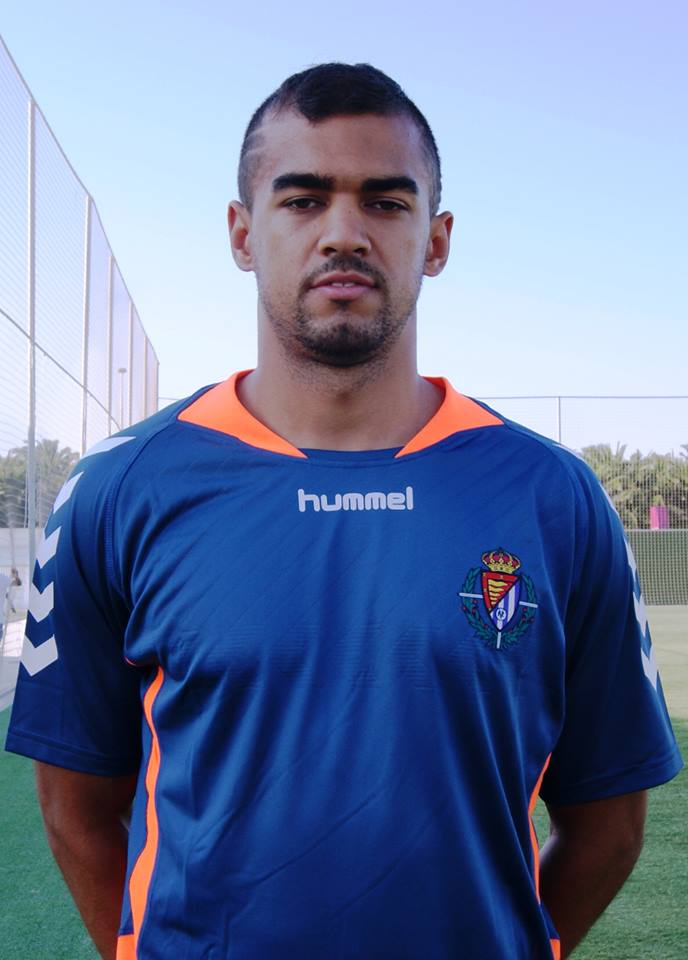 Jugador Dominico suizo